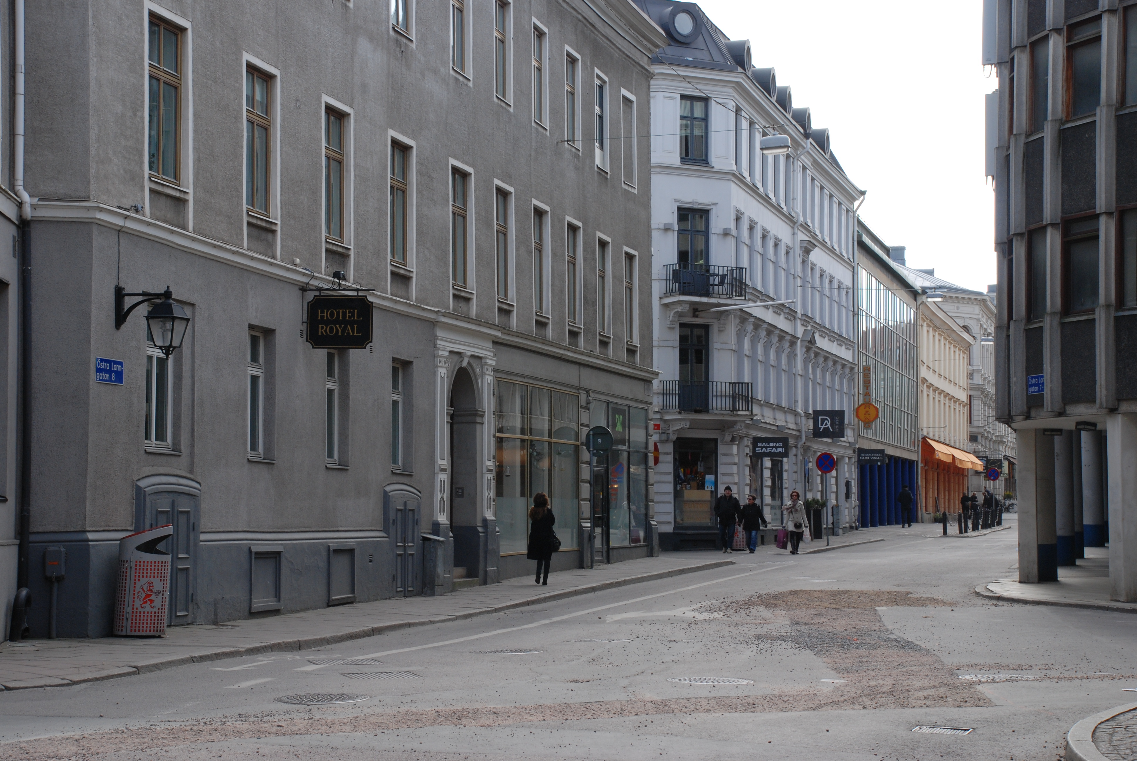 Östra Larmgatan vid korsningen med Drottninggatan.